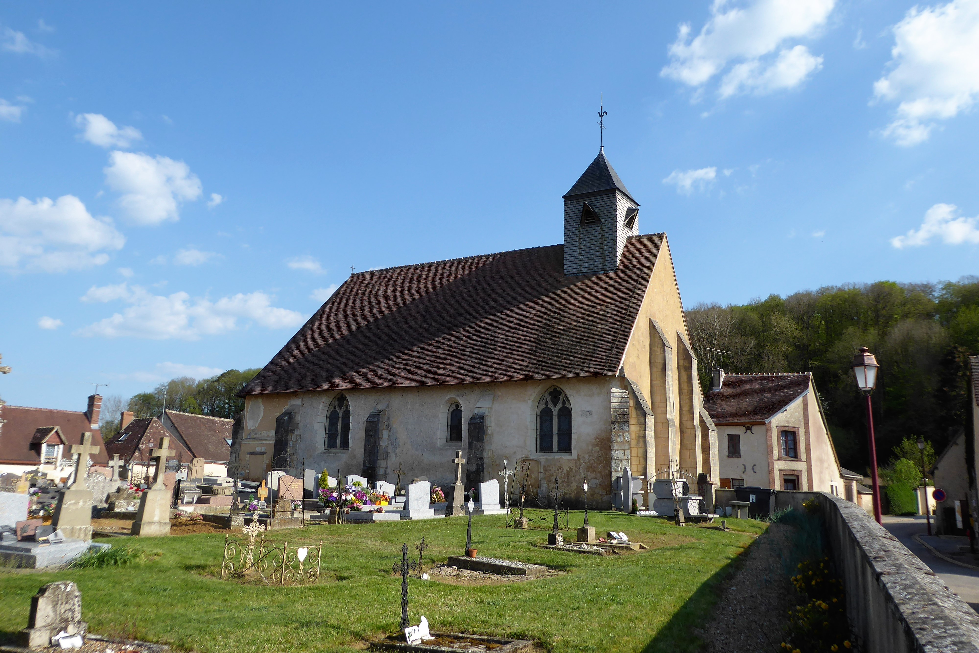 église Saint-Martin de Béthonvilliers, Eure-et-Loir, France.